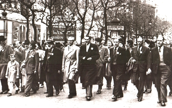 Manifestation, dans Paris, autour de 1950, avec Marceau Pivert (au centre en imperméable clair) et Georges Dardel (à sa gauche en pardessus foncé). Photothèque familiale Georges Dardel : reste à définir le thème de la manif et le lieu de la manif 4 février 2007 à 17:20 (CET)